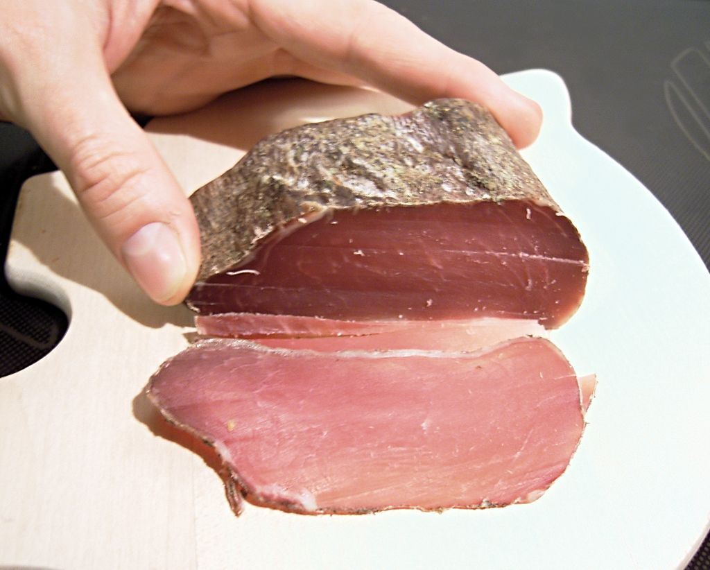 walliser Trockenfleisch